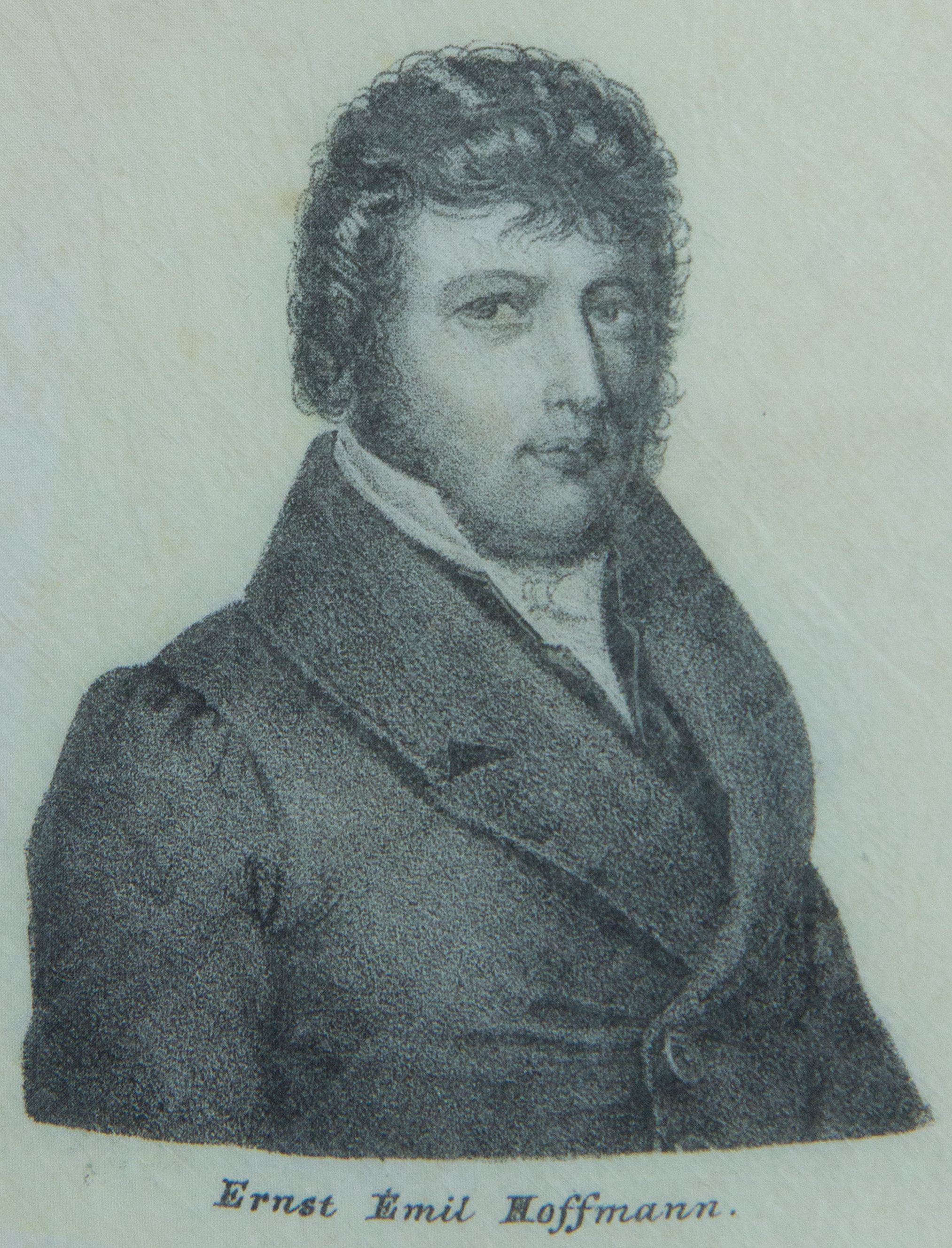 Hambacher Tuch, fotografiert im Archiv des Liberalismus in Gummersbach: Ernst Emil Hoffmann (1785-1847)